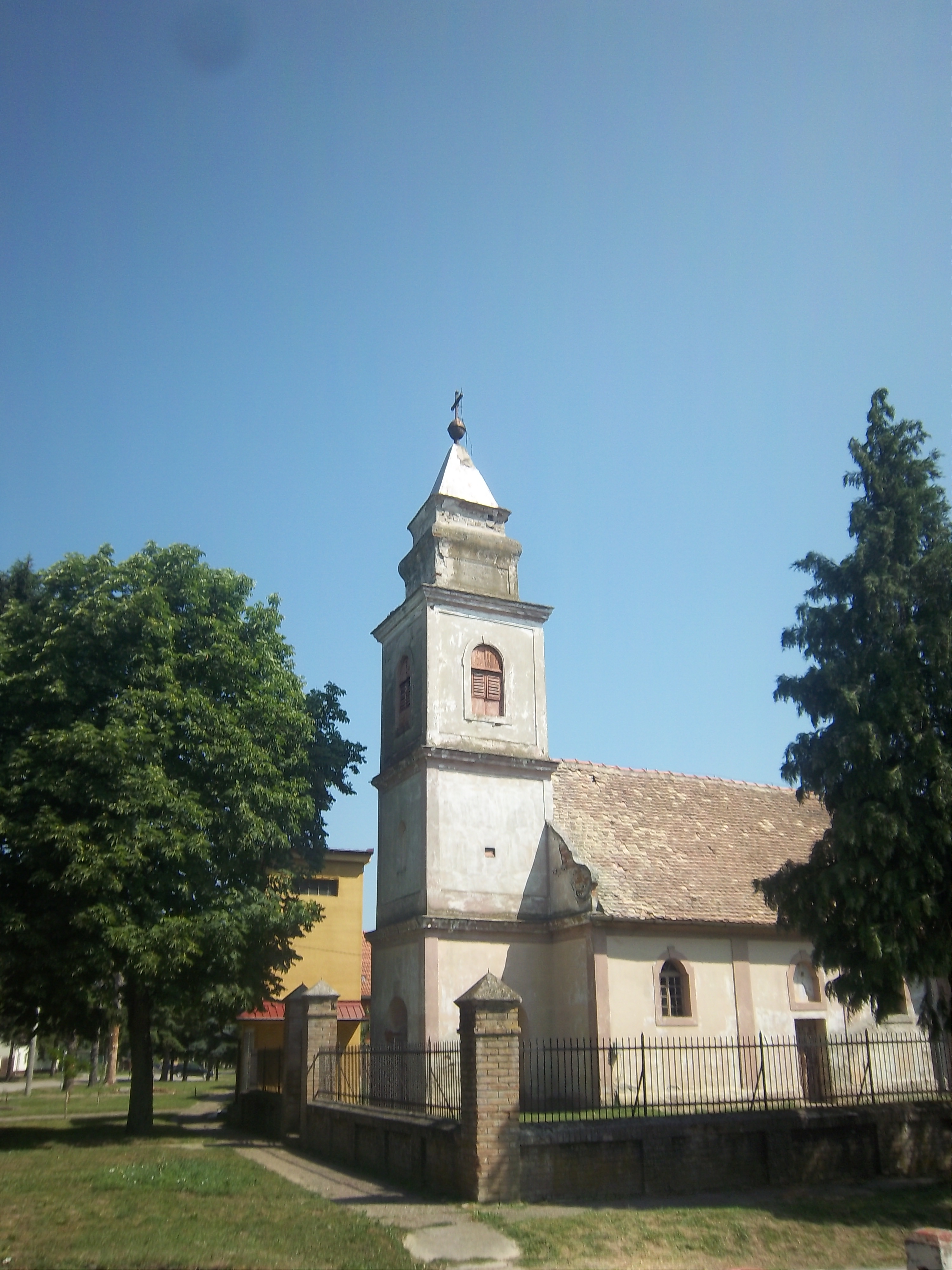 Srpskohrvatski / српскохрватски: Srpska pravoslavna crkva u naselju Čakovci u Općini Tompojevci u Vukovarsko-srijemskoj županiji (Republika Hrvatska).